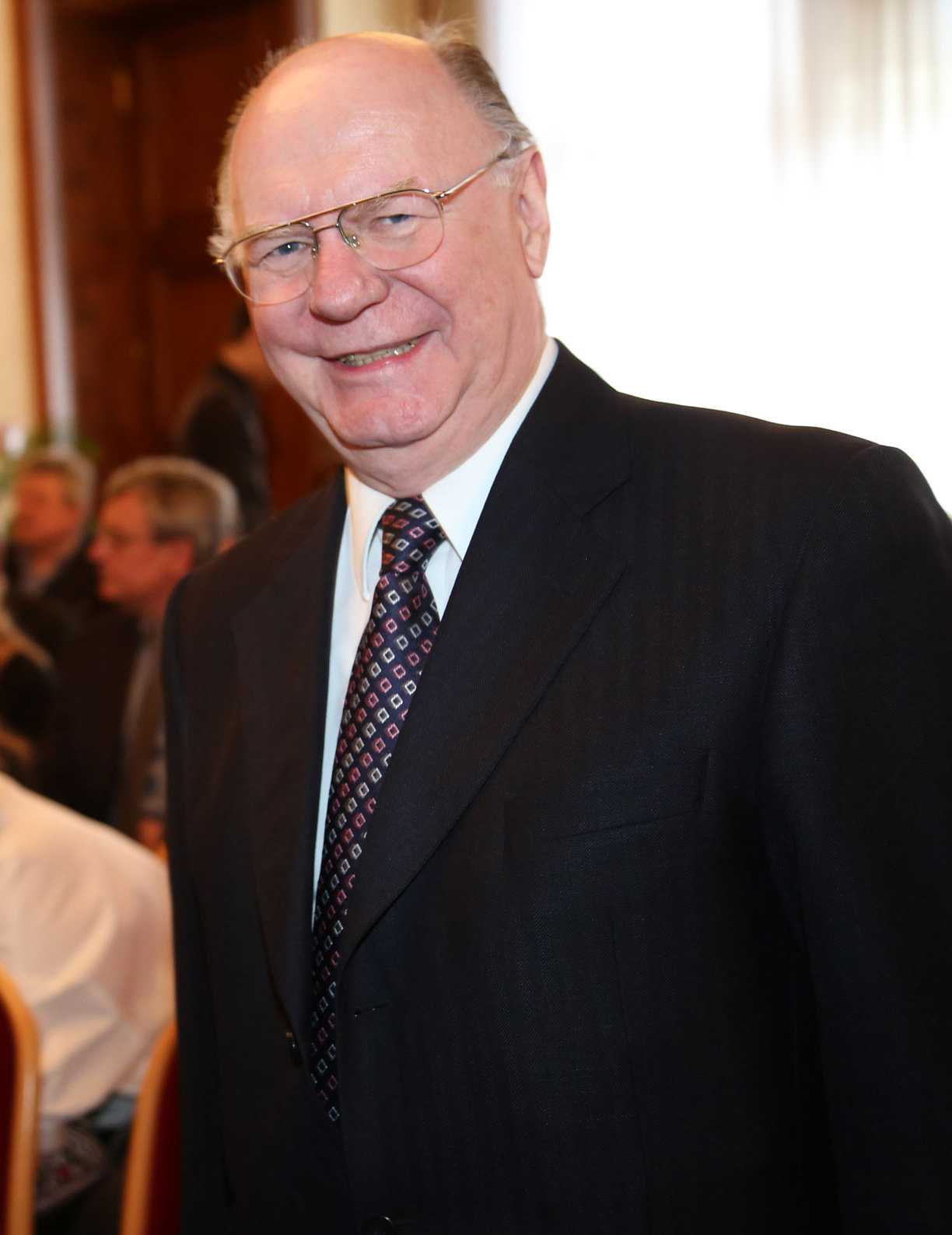 Peter Matic, Burgschauspieler, Prof. Franz Mrkvicka, Stadtrat a.D